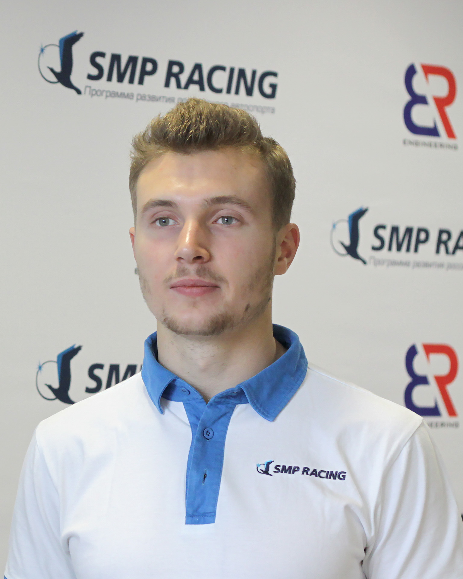 Пилот программы SMP Racing Сергей Сироткин